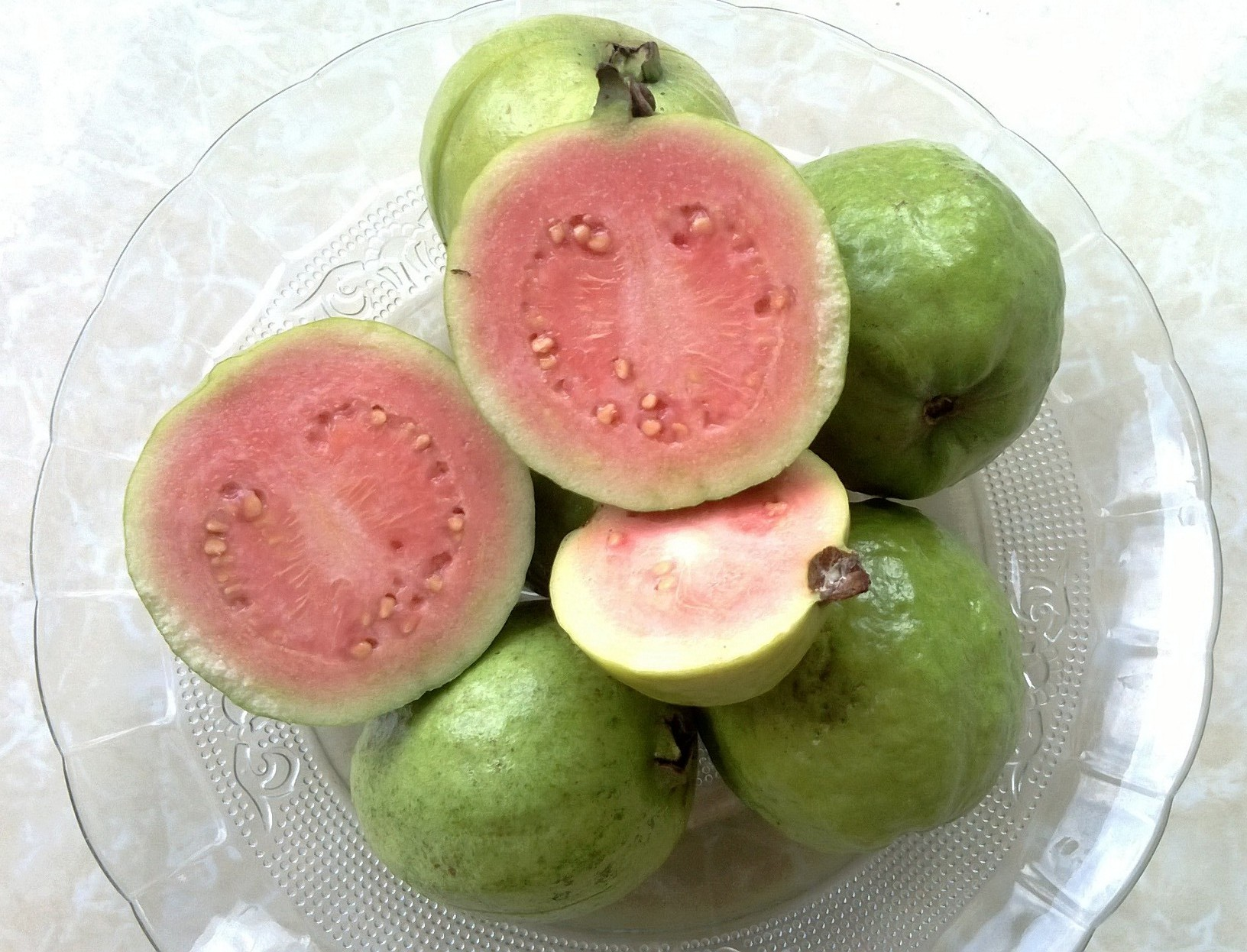 Ổi đào Việt Nam